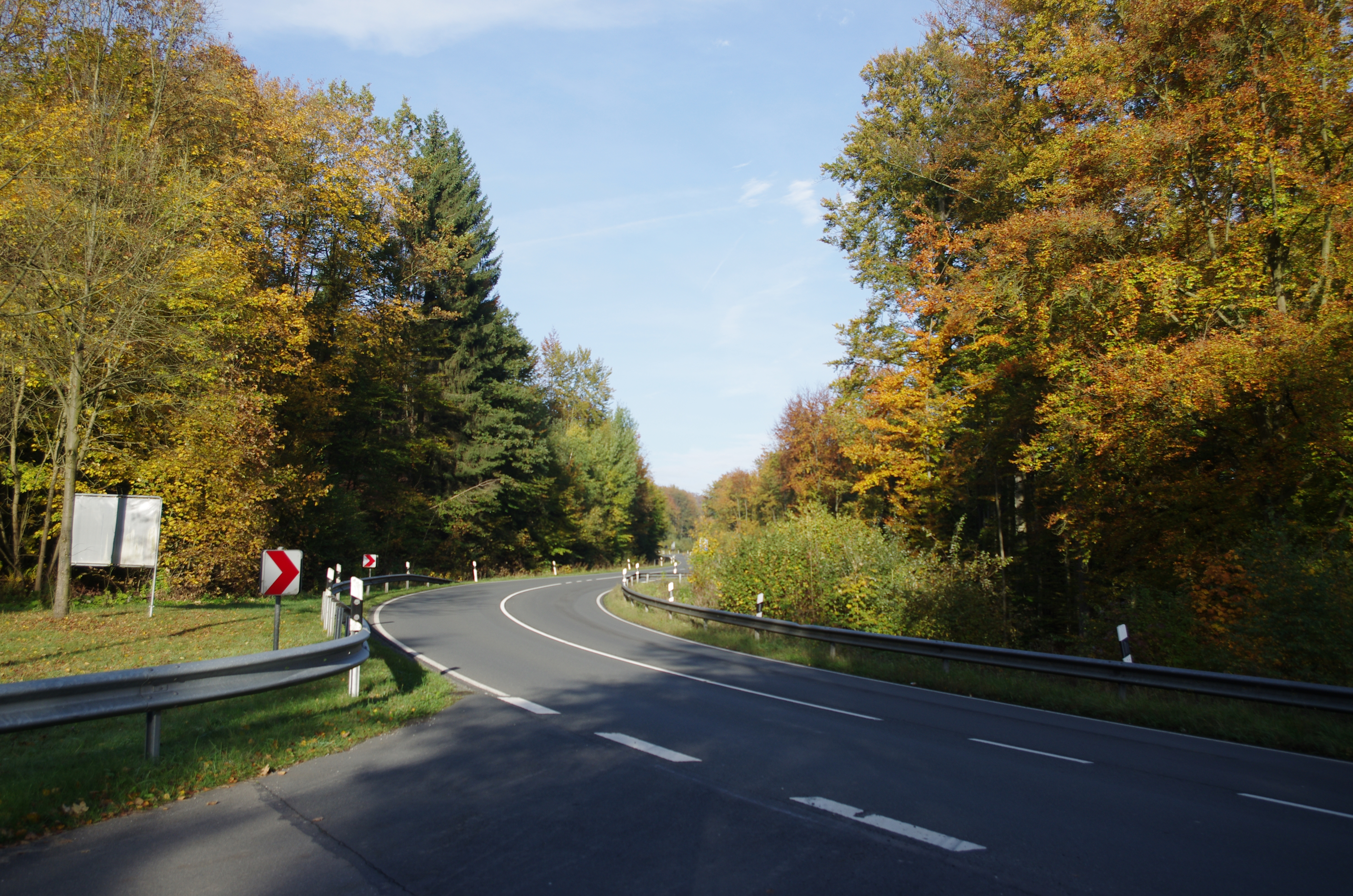 Hann. Münden In Niedersachsen. Die Straße südlich des Ortsteils Bonafath an der sogenannten Franzosenbrücke. Der Namen wurde benannt nach Schlachten im Siebenjährigen Krieg. In der Nähe der Brücke befinden sich die Mordsteine.